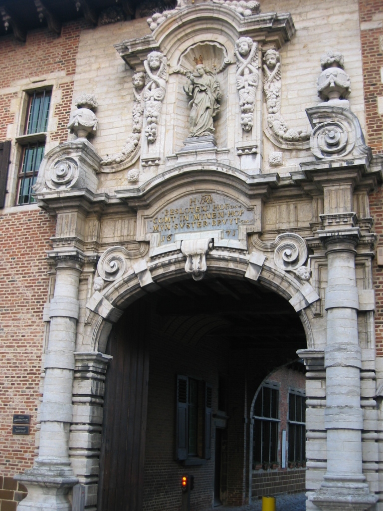 Ingang van het Begijnhof in Diest. Foto genomen door Tim Bekaert (25/2/2005)